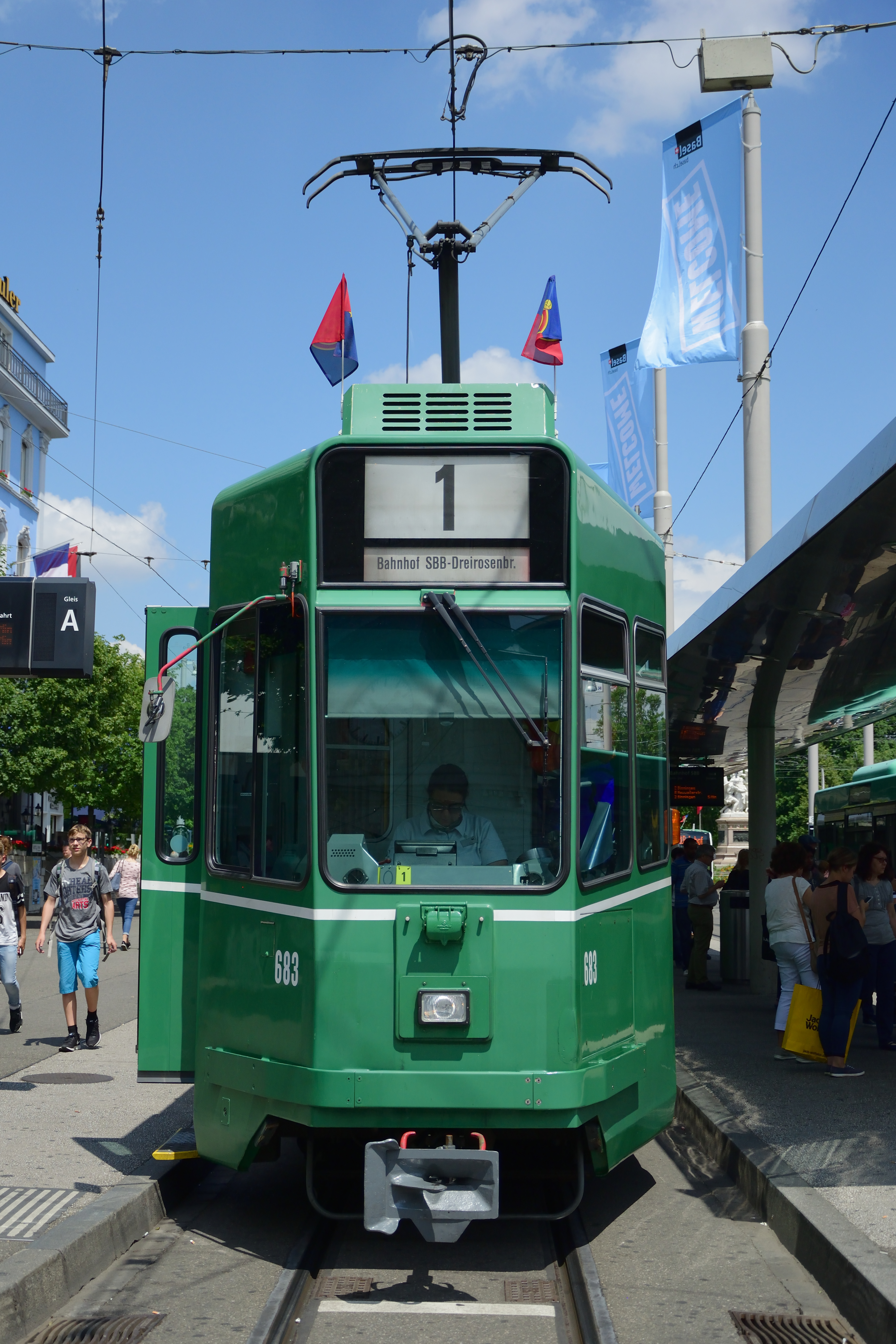 Une motrice du tramway de Bâle à l'arrêt près de la gare SBB CFF FFS